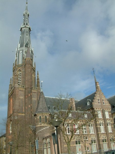 Sint-Bonifatiuskerk uit 1884 PD door eigen werk